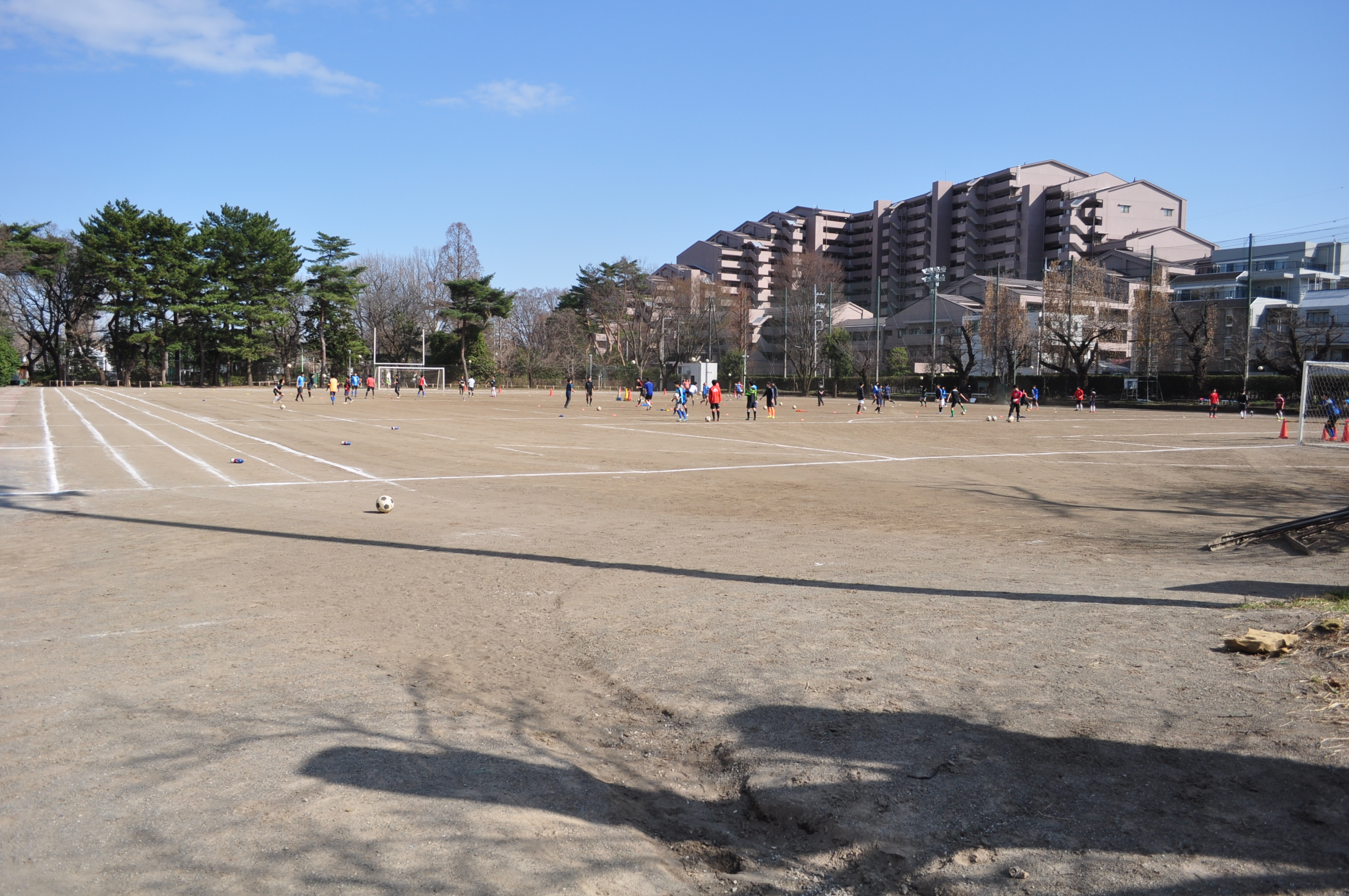 桐朋中学校・桐朋高等学校 Nikon D5000